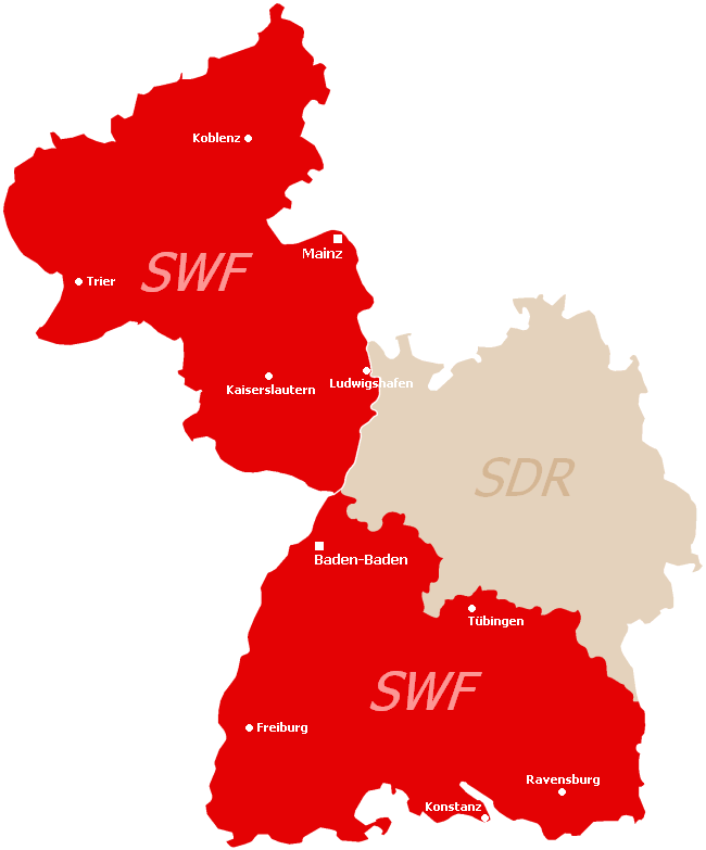 Karte des Sendegebiets des Südwestfunks (1946–1998) mit den Landesfunkhäusern und Studios.